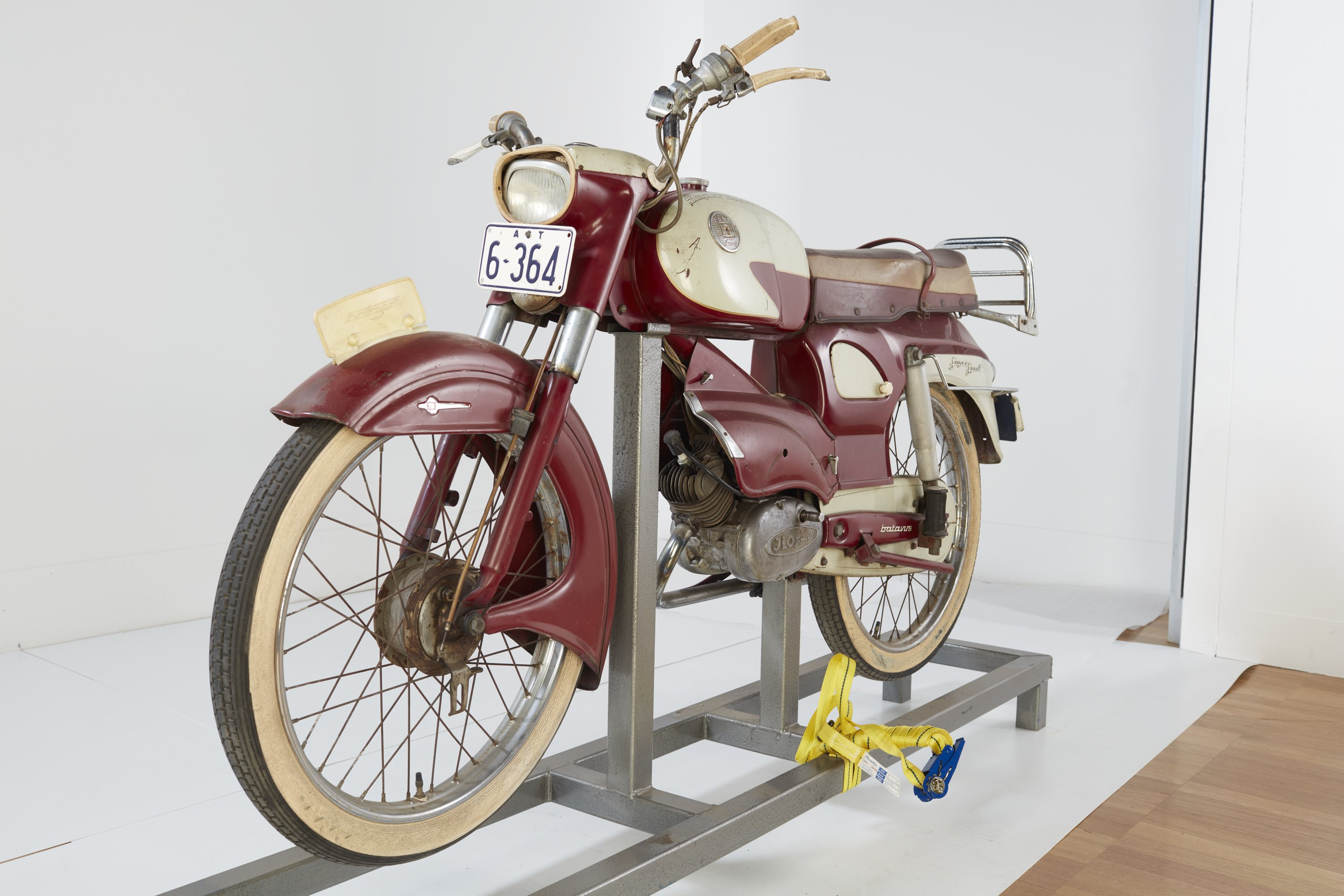 Motor Cycle - Batavus Bilonet G50 'Super Sport', circa 1960